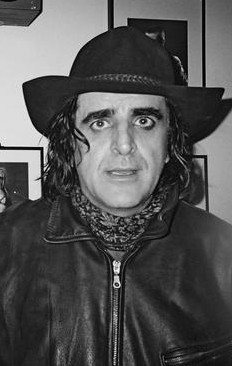 Jaz Coleman